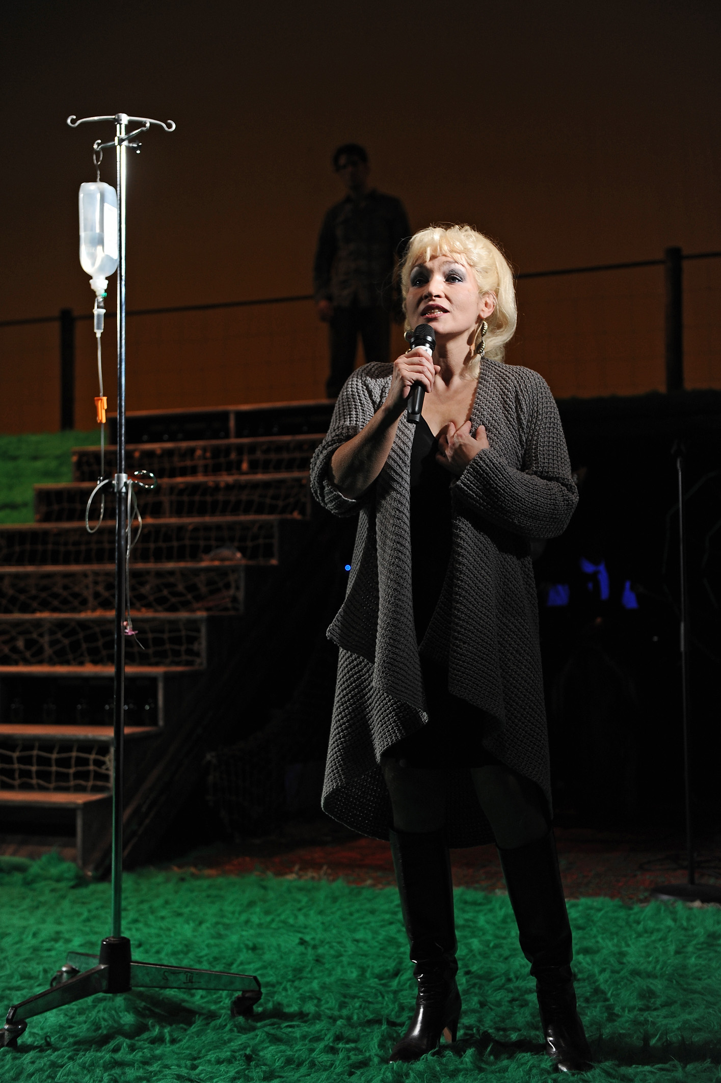 Musical "Meta, Norddeich" Landesbühne Niedersachsen Nord